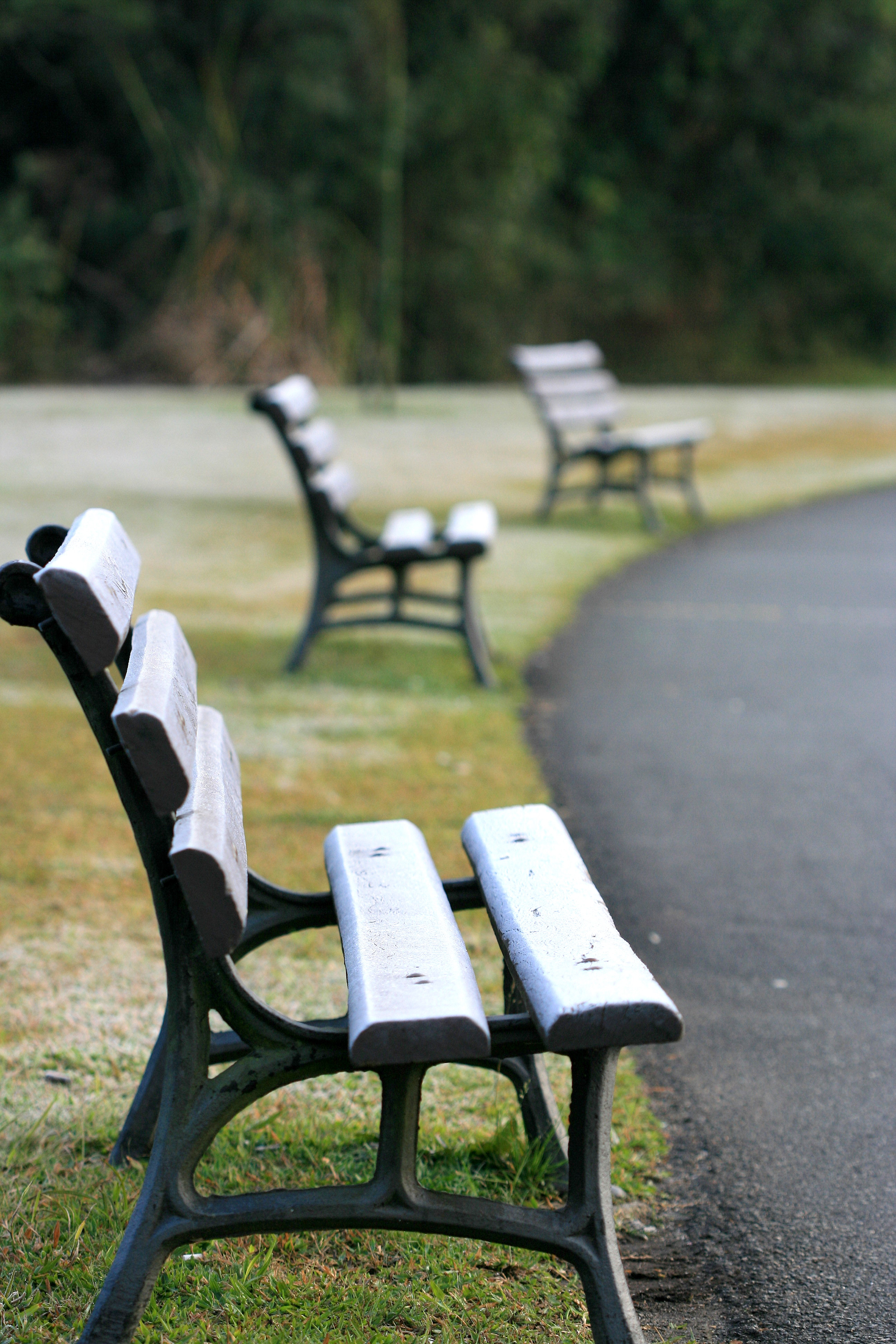 Bancos cobertos de geada.